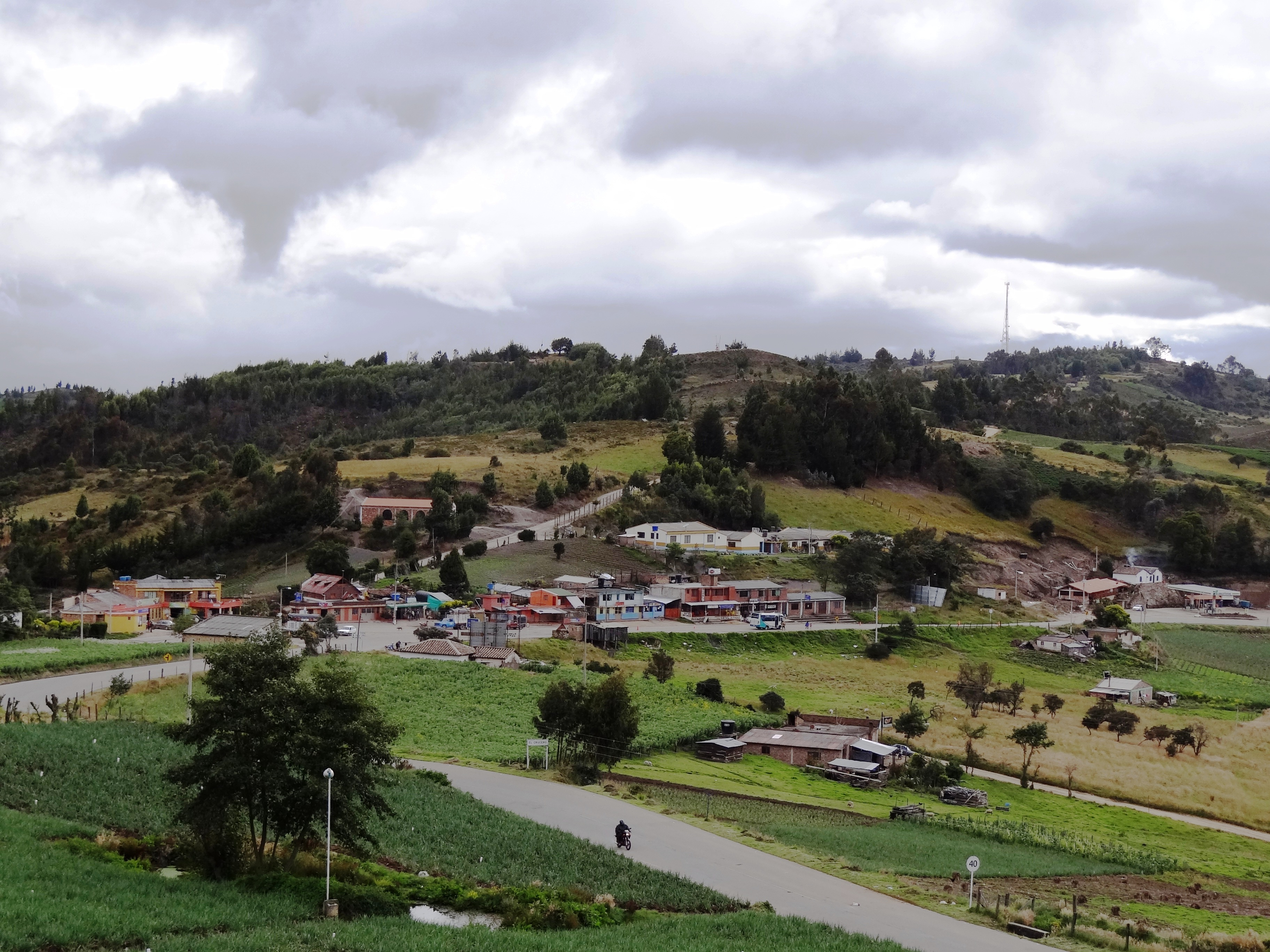 Sitio El Crucero en inmediaciones a la Laguna de Tota, departamento de Boyacá, Colombia